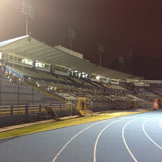 Tribuna y palcos del estadio Mateo Flores.